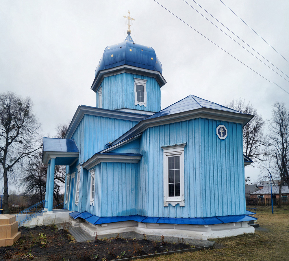 Богороднича церква на Джупинівці